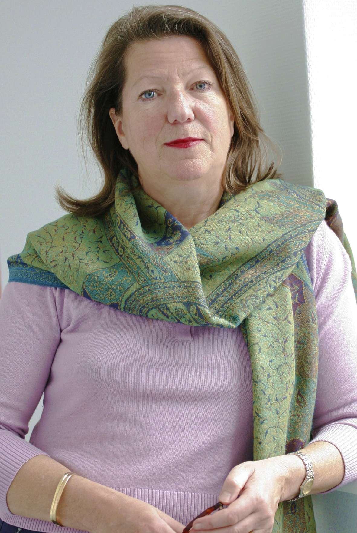 Anne Marie Freybourg